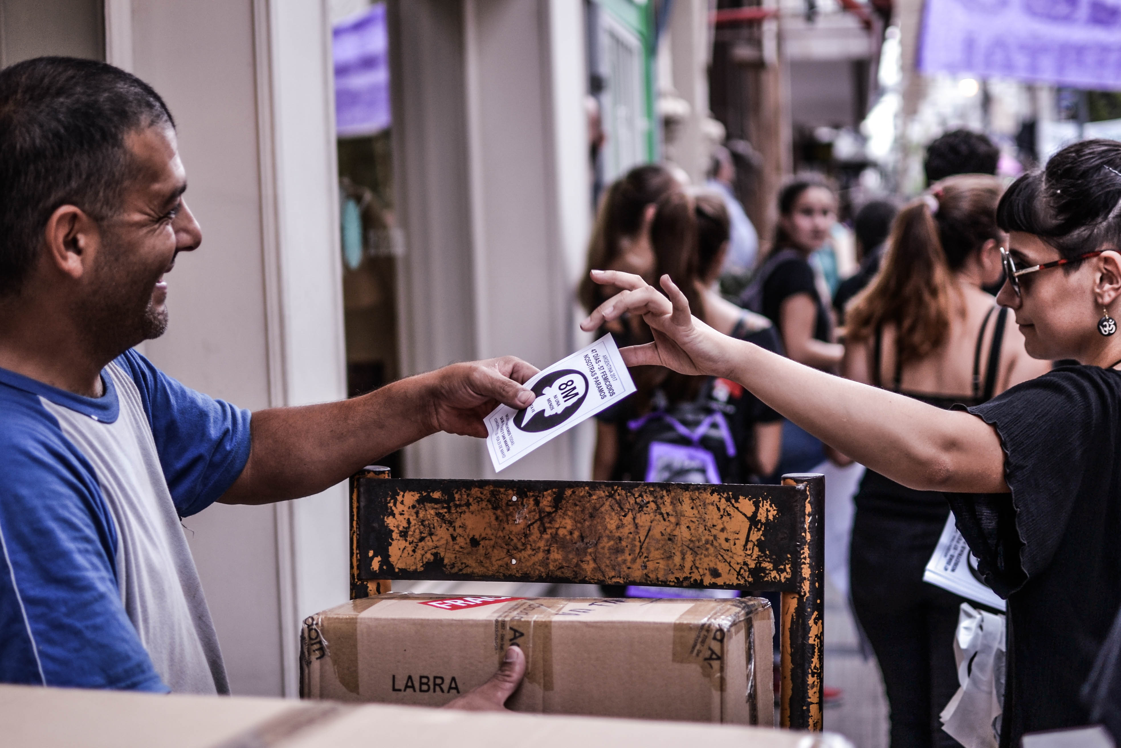 Paro Internacional de Mujeres en Santa Fe 2017 - Nosotras Paramos - 8M